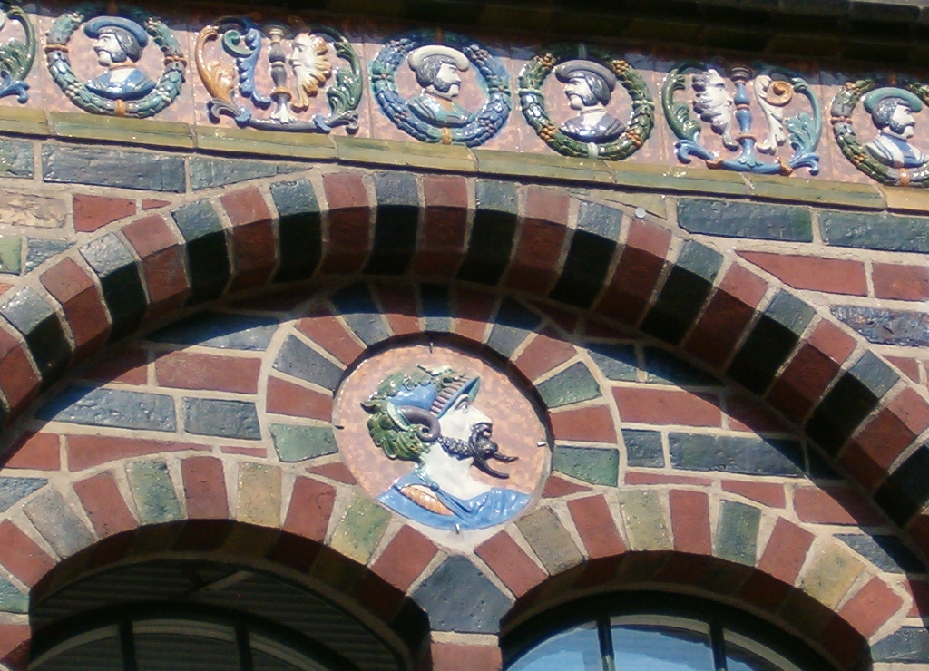 Kerckhoffhaus Rostock, Detail